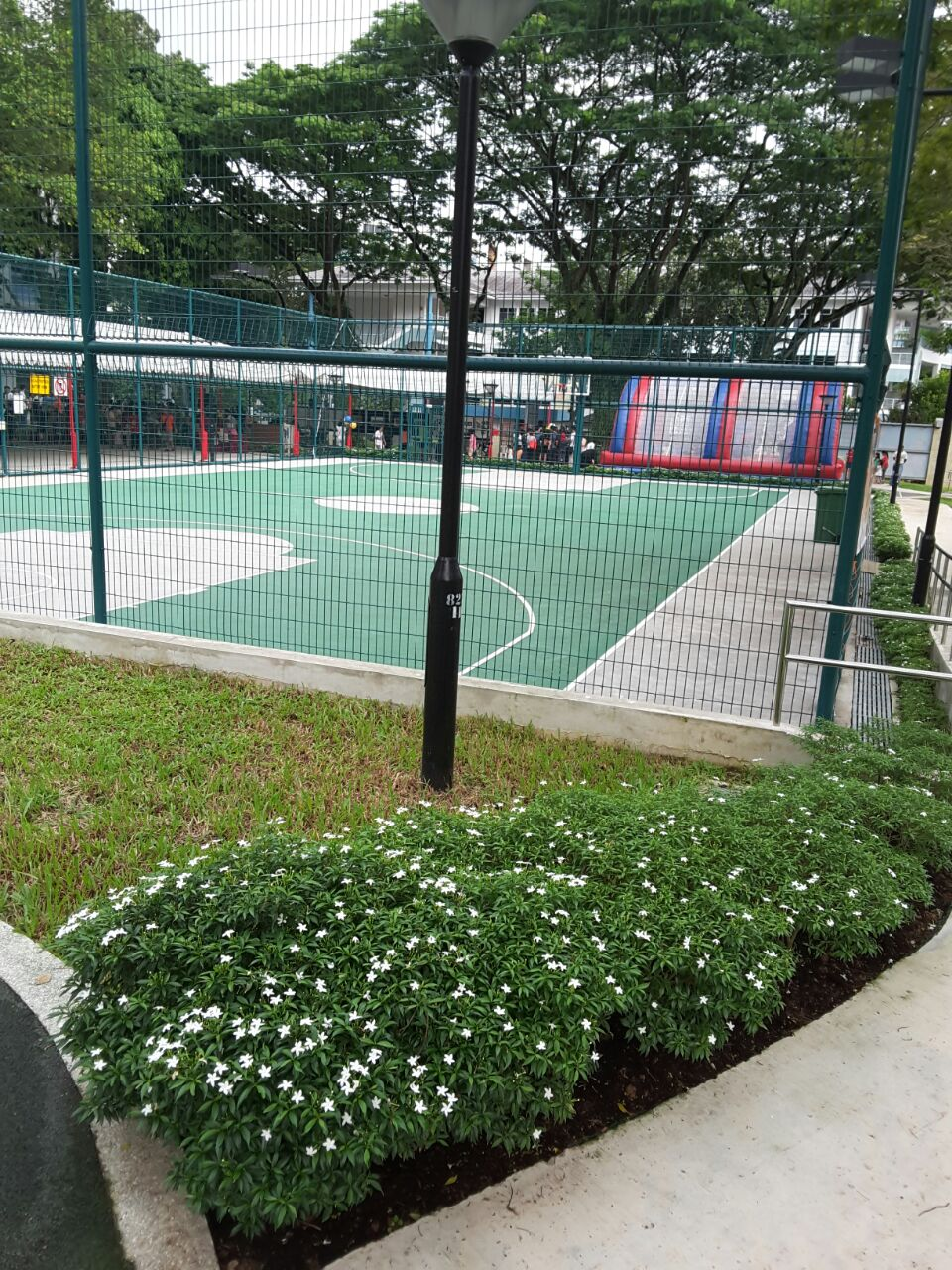 Gelanggang bola keranjang di Singapura